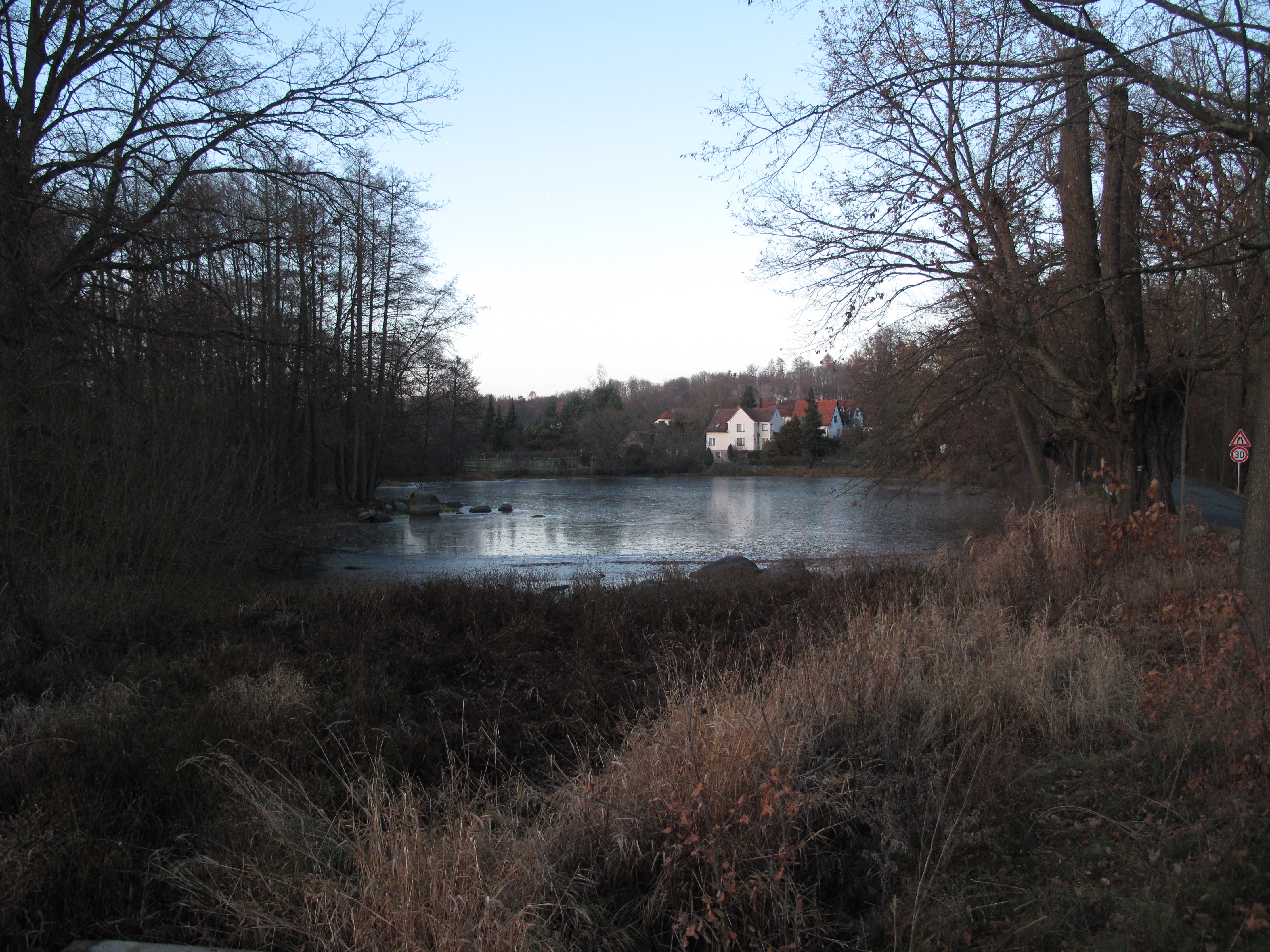 Rybník Křísov ve Štiříně, okres Praha-východ.